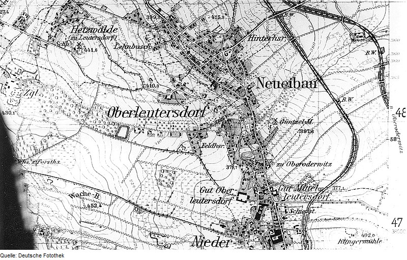 Original image description from the Deutsche Fotothek Eibau-Neueibau. Meßtischblatt, Sekt. Löbau, 1884